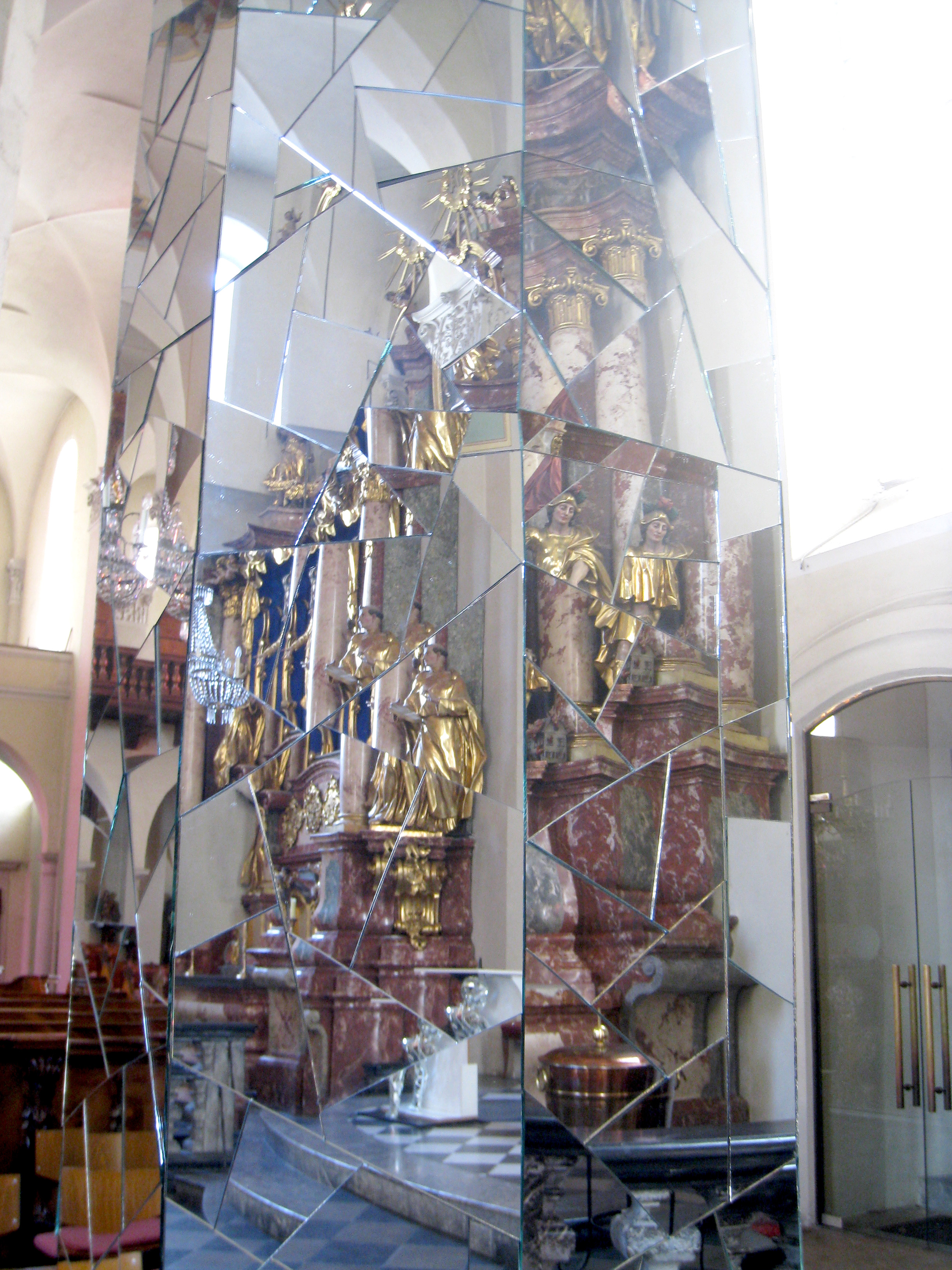 Graz Andräkirche, Verkleidung eines achteckigen Pfeilers mit Spiegelstücken